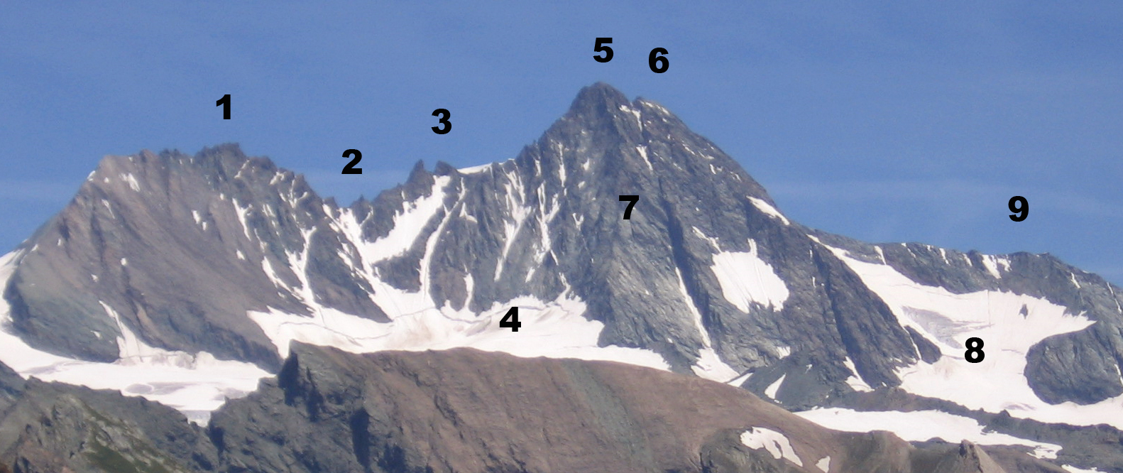 Großglockner von Südwesten: 1=Glocknerwand, 2=Untere Glocknerscharte, 3=Teufelshorn (links) und Glocknerhorn (rechts), 4= Teischnitzkees, 5=Großglockner, 6=Kleinglockner, 7= Stüdlgrat, 8=Ködnitzkees, 9=Adlersruhe